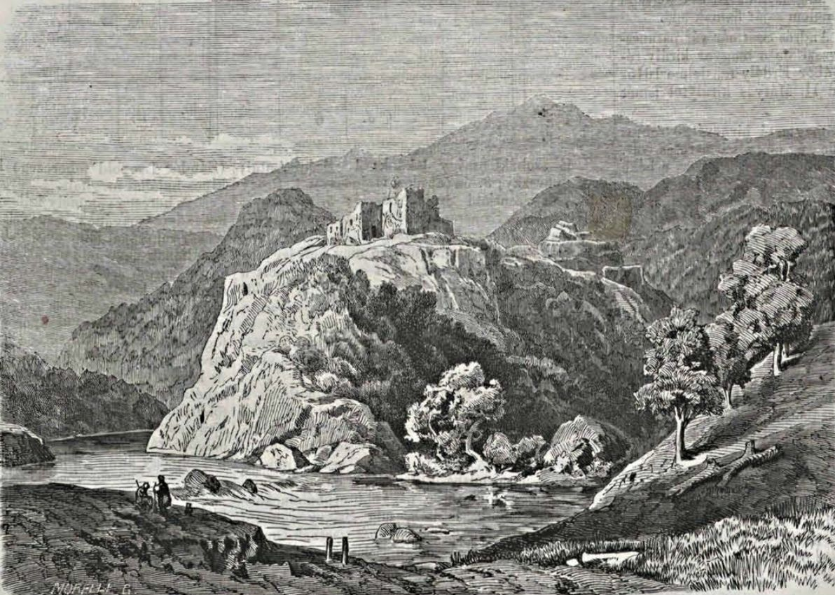 Kővár vára Keleti Gusztáv rajzán